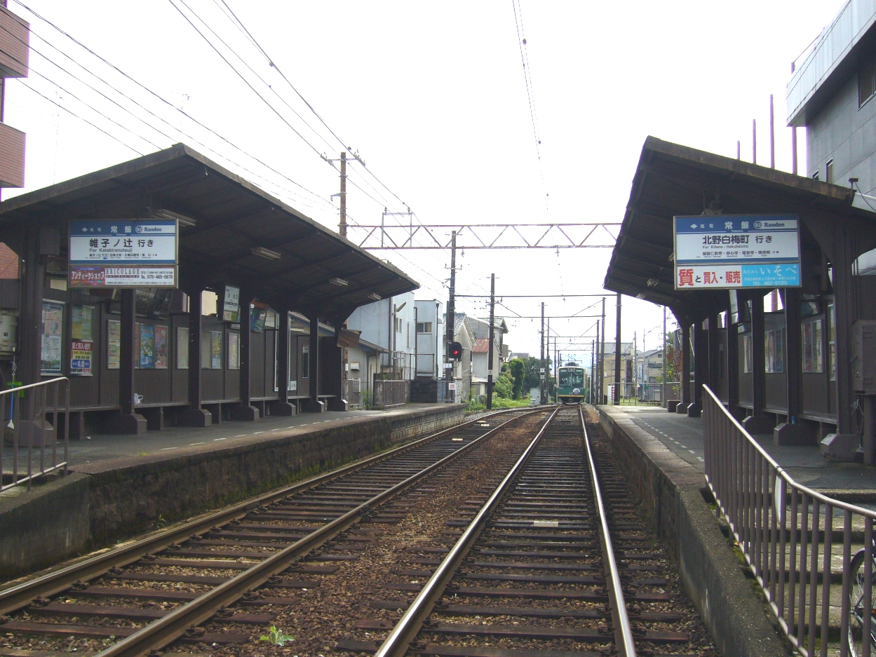 京福電気鉄道北野線常盤駅。向こうに見えるのは帷子ノ辻駅行きの電車の後姿。2007年9月10日に投稿者が撮影。